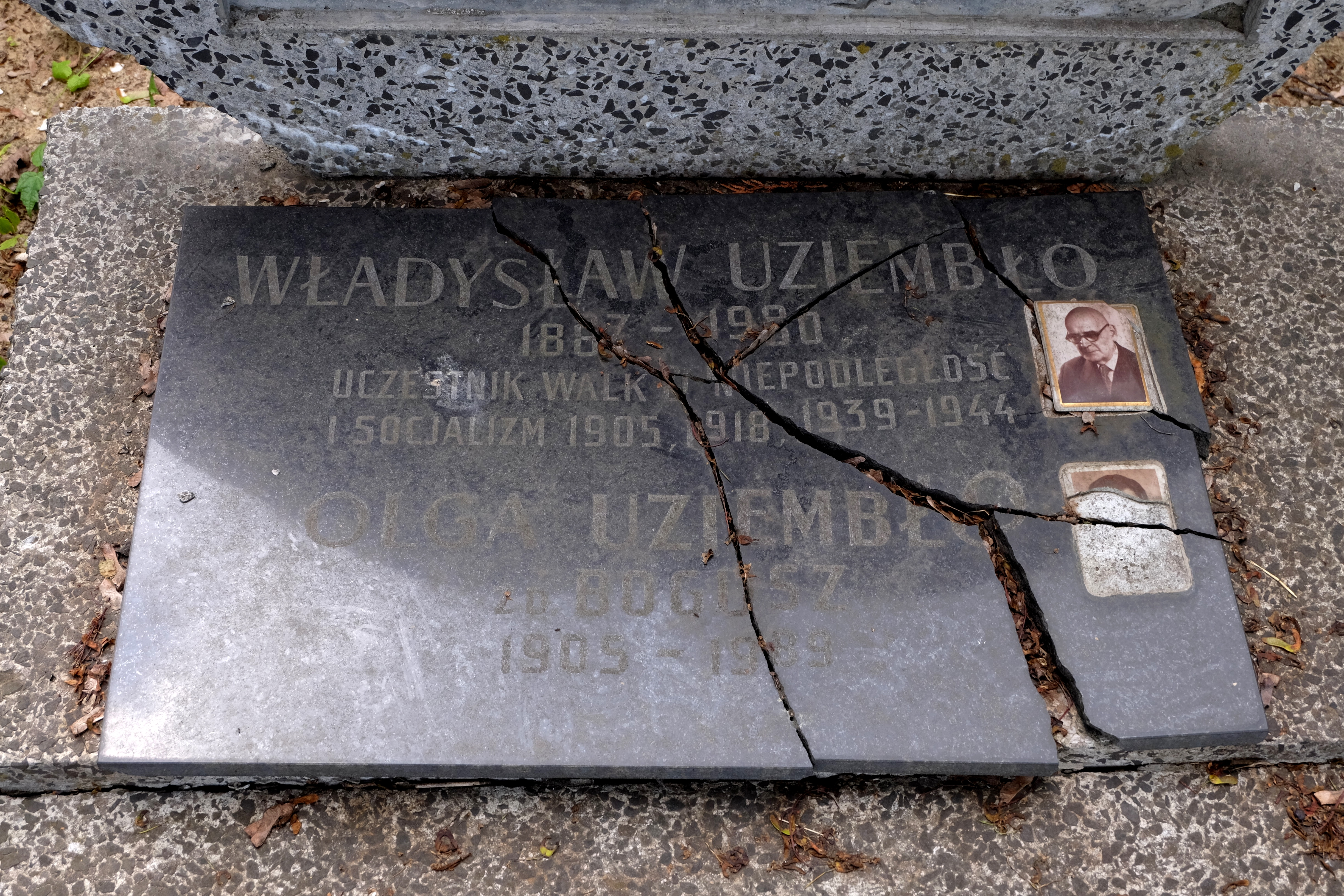 Tablica na grobie działacza politycznego i samorządowego Władysława Uziembło na Cmentarzu Wojskowym na Powązkach w Warszawie